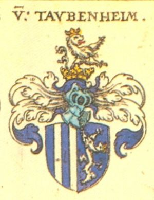 Coat of Arms, Taubenheim Family, Meissen Saxony (from: Johann Siebmacher: New Wappenbuch, scan from: Horst Appuhn, Johann Siebmachers Wappenbuch. Die bibliophilen Taschenbücher 538, 2. verb. Aufl , Dortmund 1989 Meißner, Blatt 151)